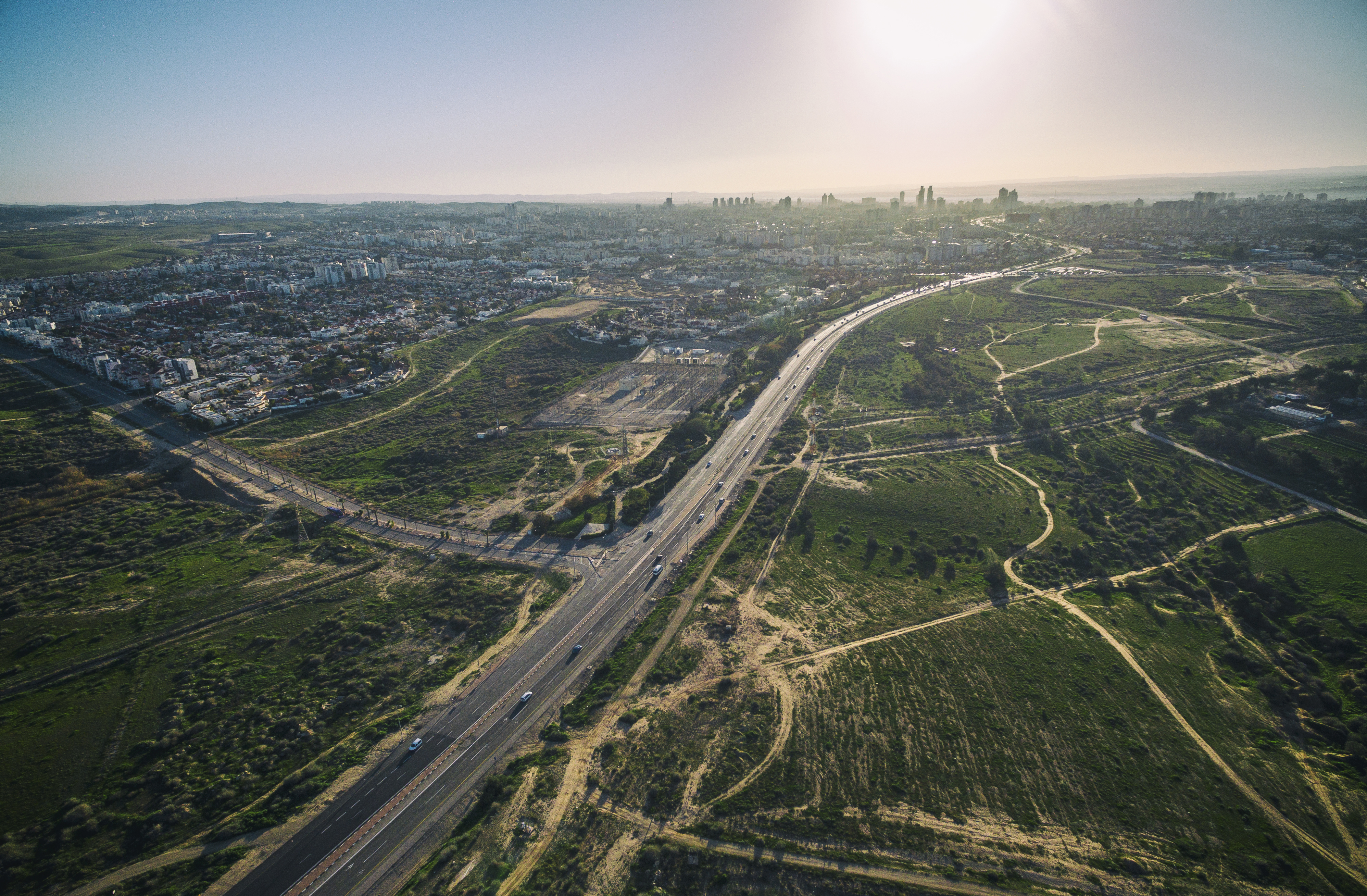 Беэр - Шэва с птичьего полета